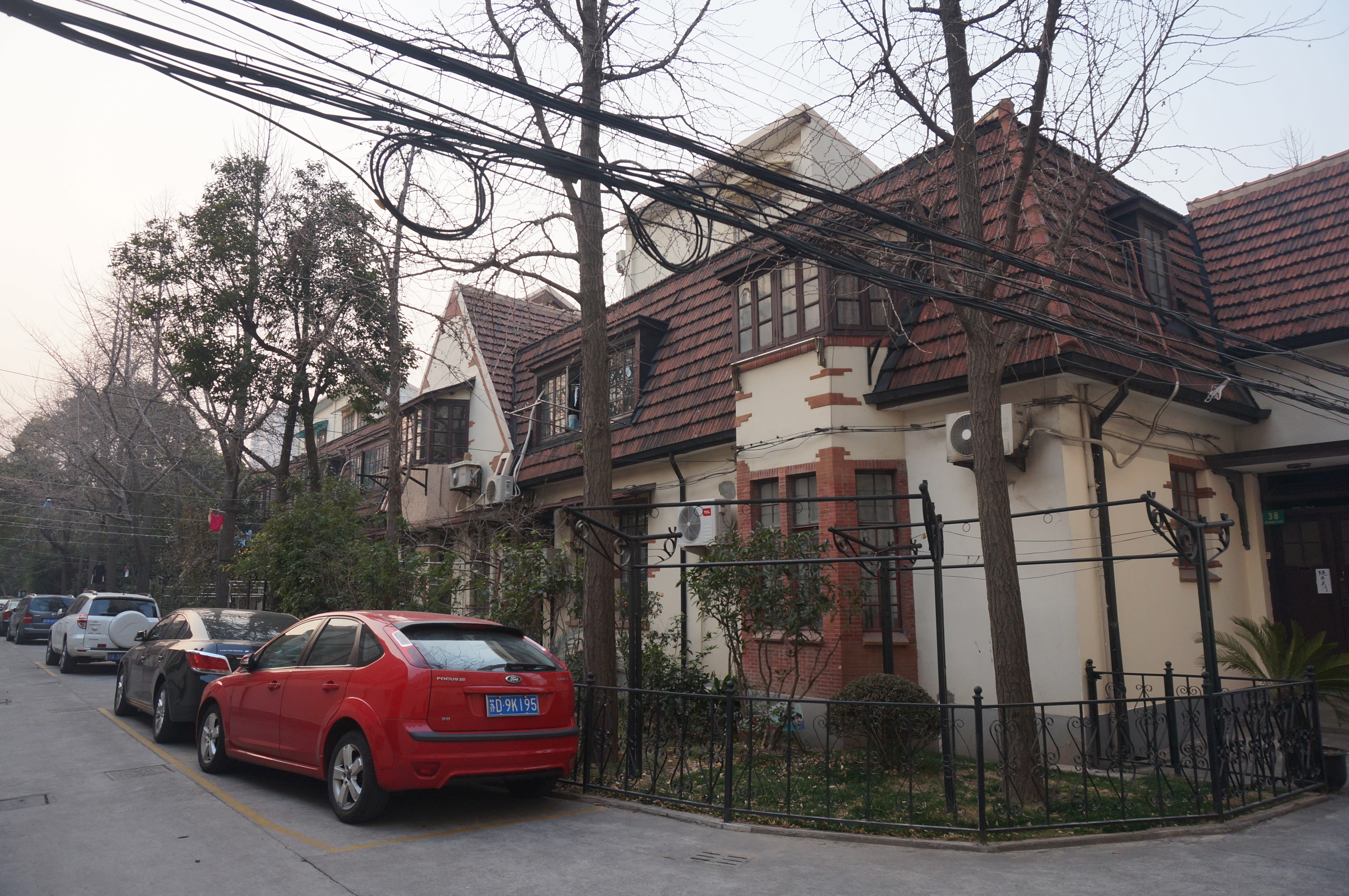 上海长乐村